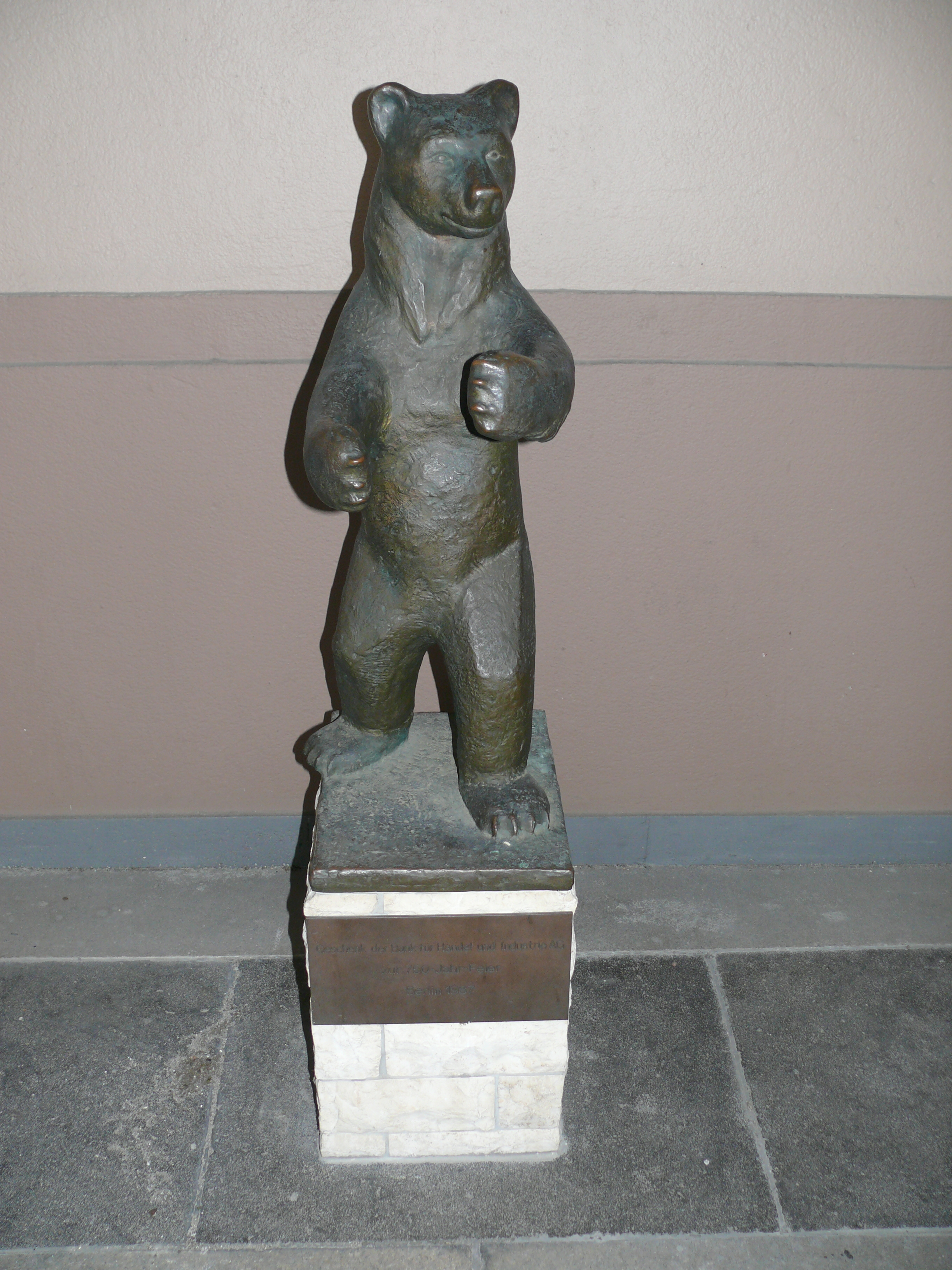 Rathaus Wilmersdorf Bronzebär von Hildebert Kliem (21.3.1927 – 22.3.1986)